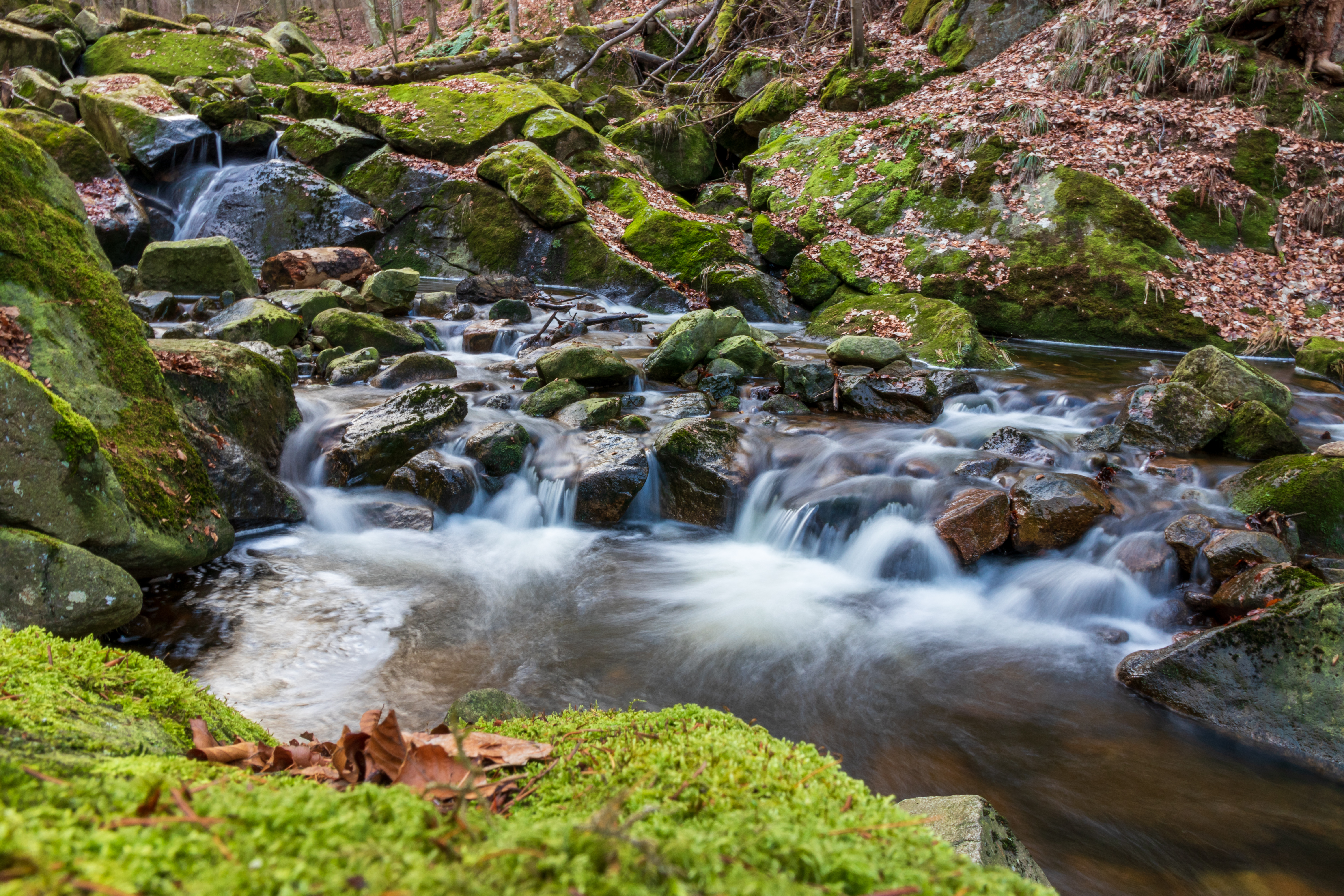 Die Ilse bei Ilsenburg im LSG Harz Und Nördliches Harzvorland